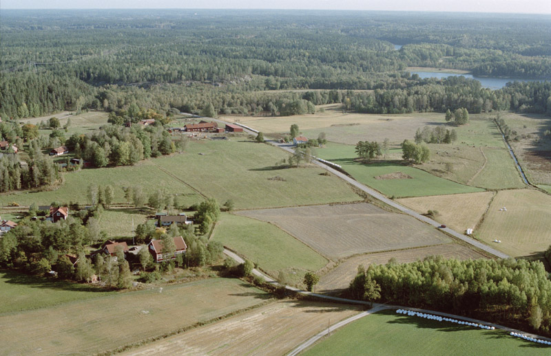 Eriksgatan Önnersta-Penningby vid Stene. Bilden är tagen mot (väderstreck): NO Motiv: Stene Nyckelord: Flygbilder, Riksintressen Kategori: FärdvägEriksgatan Önnersta-Penningby vid Stene. Bilden är tagen mot (väderstreck): NO.